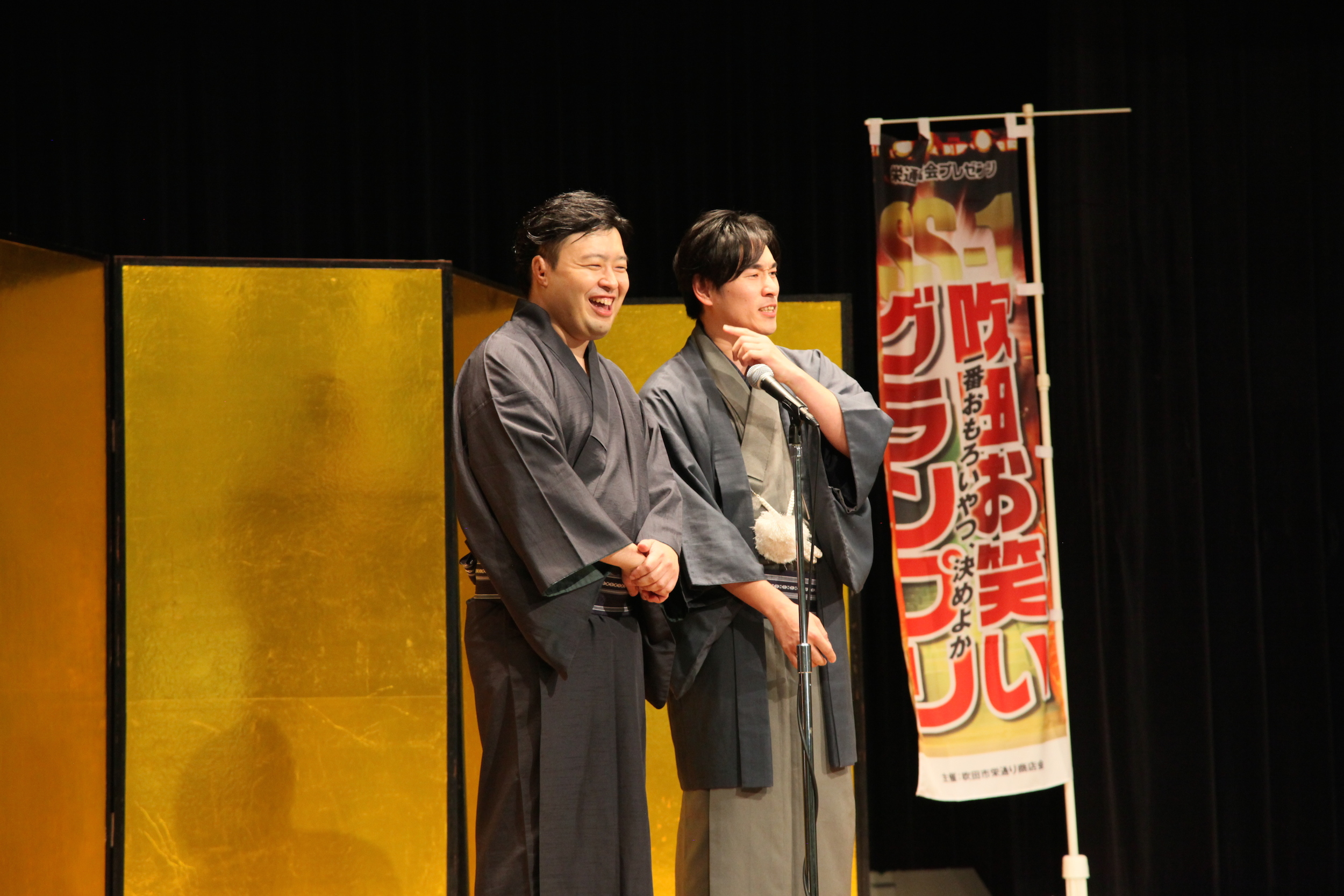 吹田お笑いグランプリ2018 決勝にて